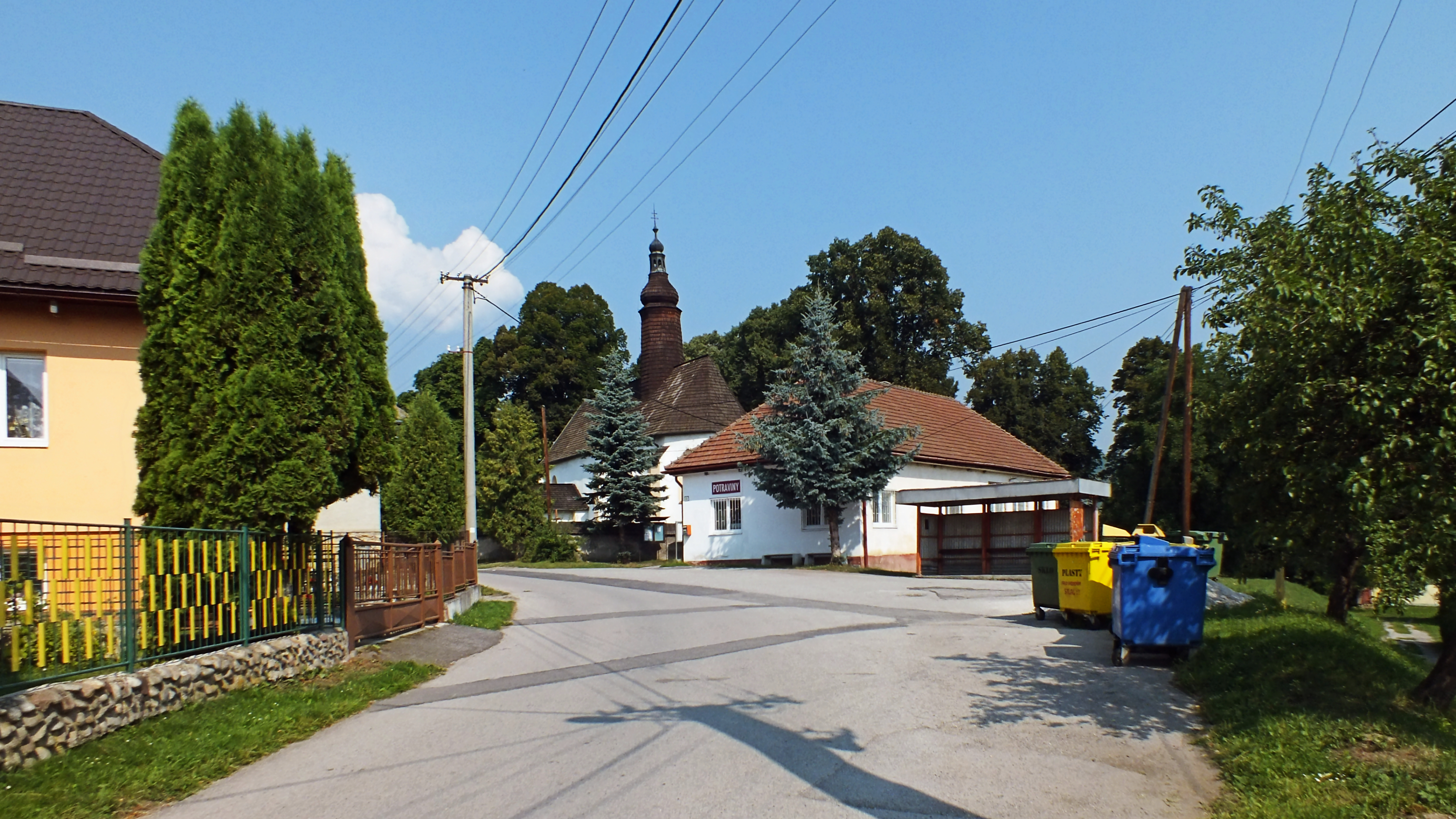 Liptowski Michał, centrum wsi